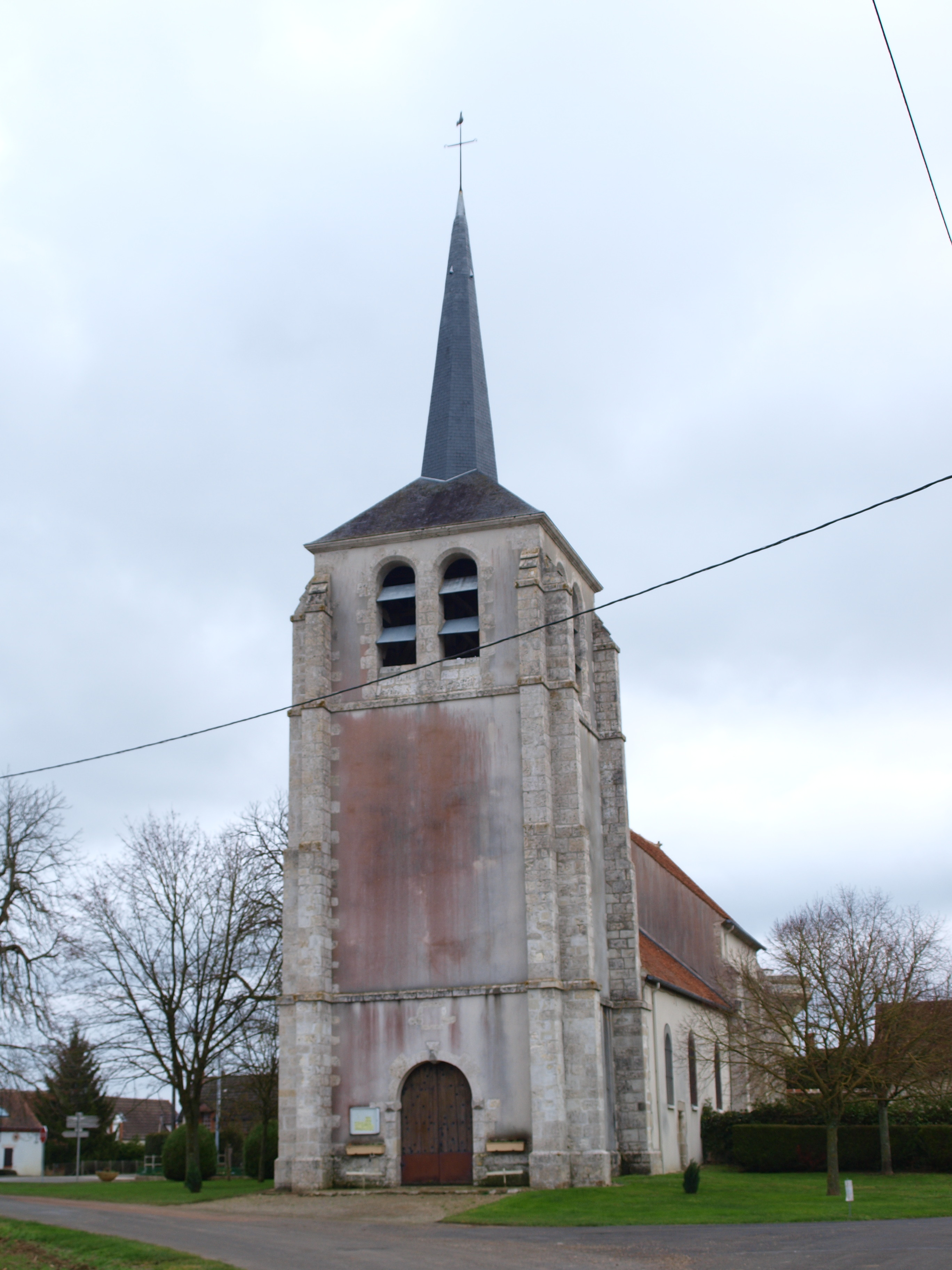 Moulon (Loiret, France) ; église